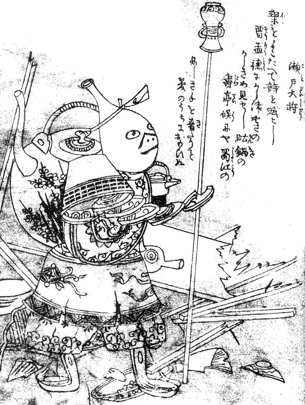 Setodaishō (瀬戸大将) from the Gazu Hyakki Tsurezure Bukuro (百器徒然袋)